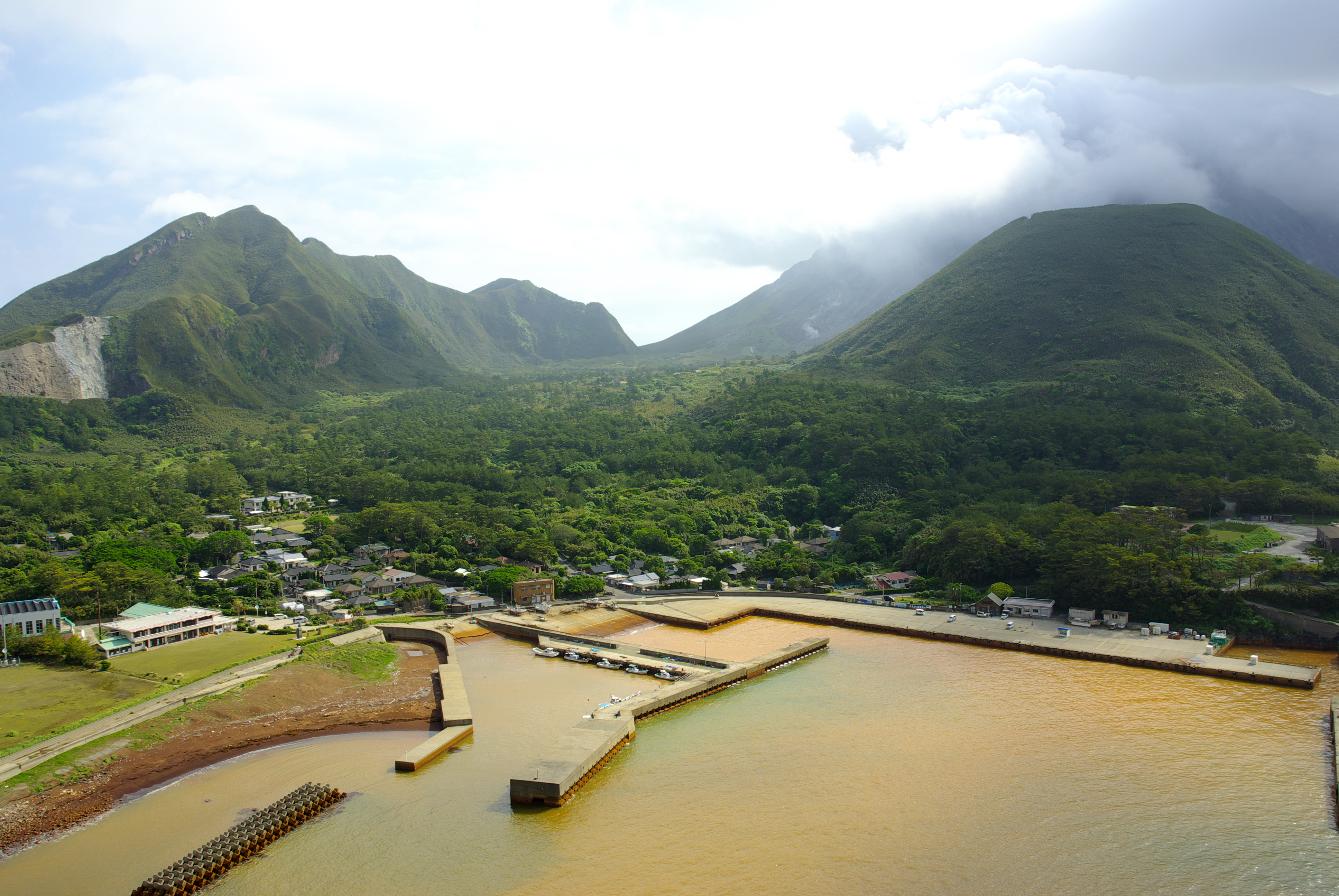 薩摩硫黄島中心集落付近。右に稲村岳、左に矢筈山。岬橋より撮影。